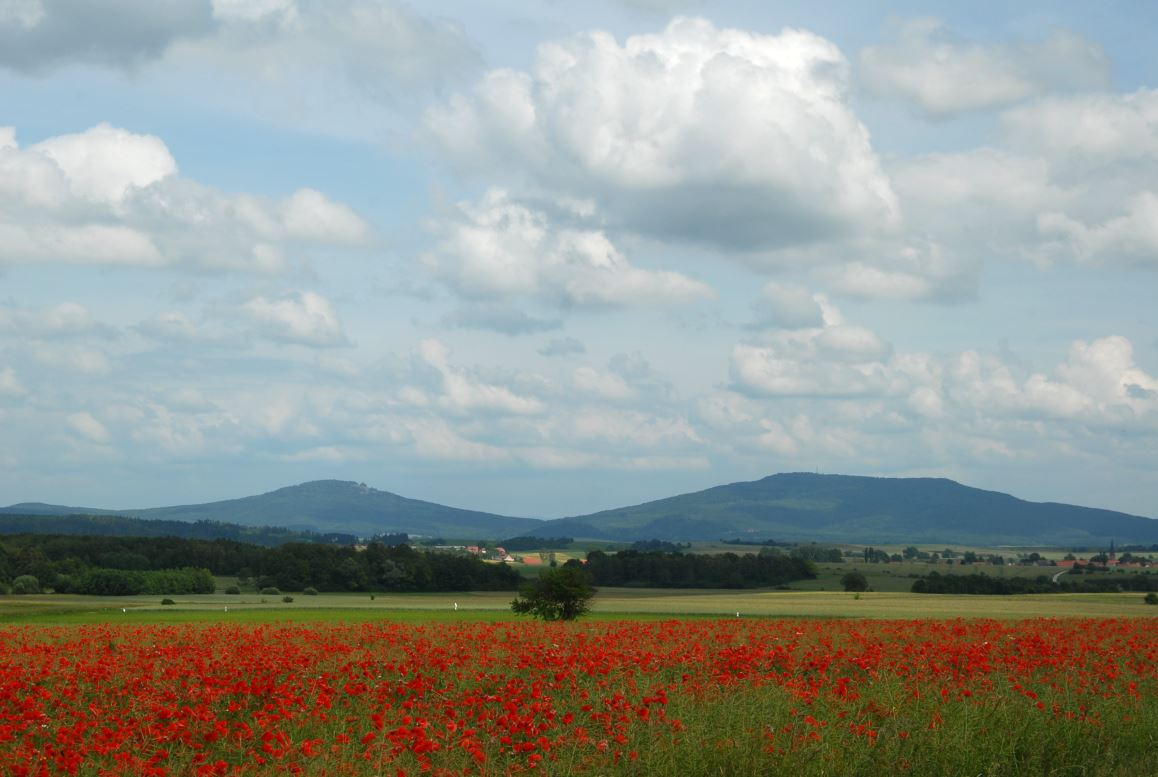 kleiner und großer Gleichberg